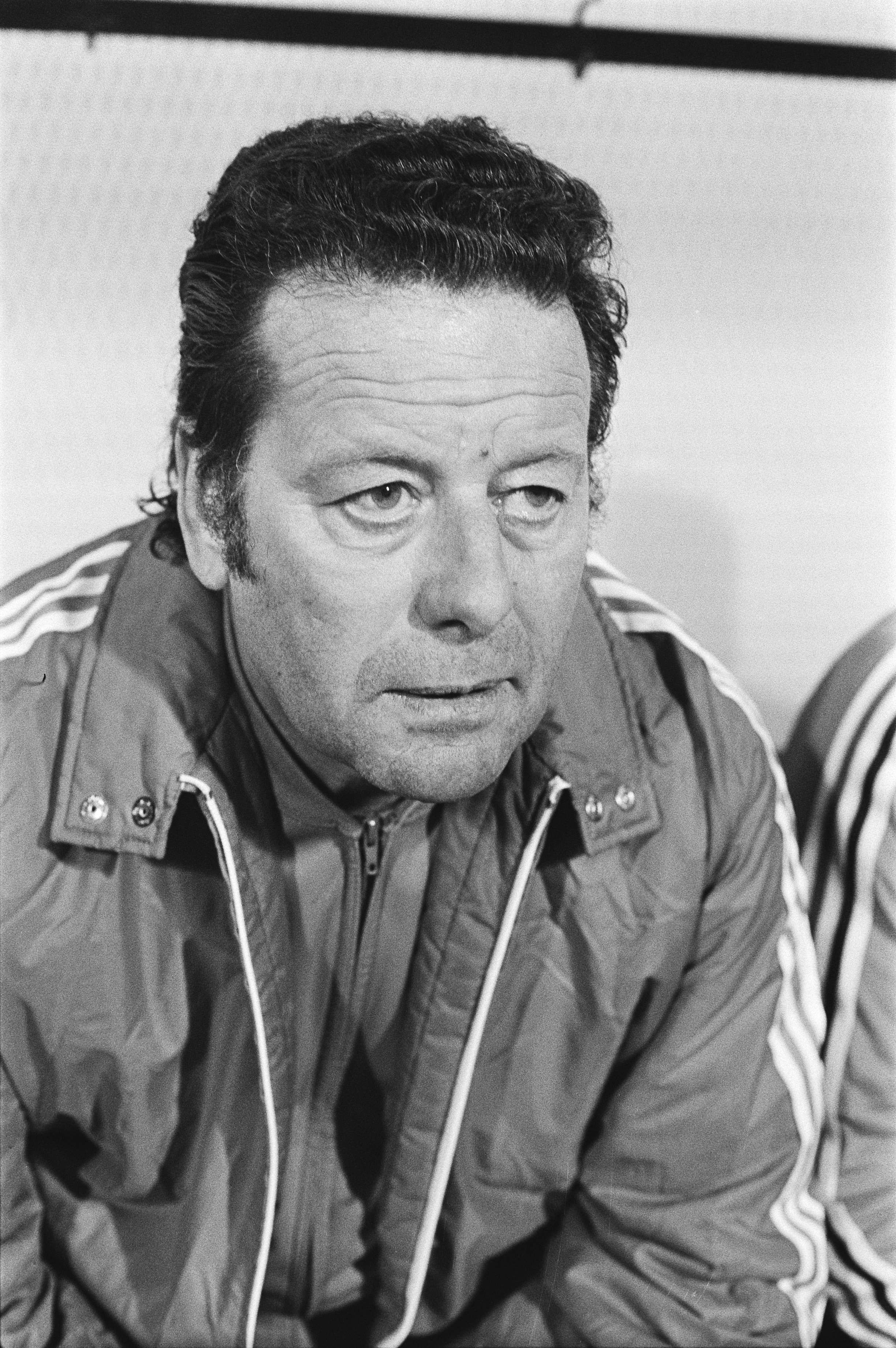 Collectie / Archief : Fotocollectie Anefo Reportage / Serie : [ onbekend ] Beschrijving : Belgie tegen Nederland 1-2, Belgie, trainer Guy Thijs kop Datum : 22 mei 1976 Locatie : België, Nederland Trefwoorden : sport, trainers, voetbal Persoonsnaam : Guy Thijs Instellingsnaam : Nederland Fotograaf : Verhoeff, Bert / Anefo Auteursrechthebbende : Nationaal Archief Materiaalsoort : Negatief (zwart/wit) Nummer archiefinventaris : bekijk toegang 2.24.01.05 Bestanddeelnummer : 928-5992